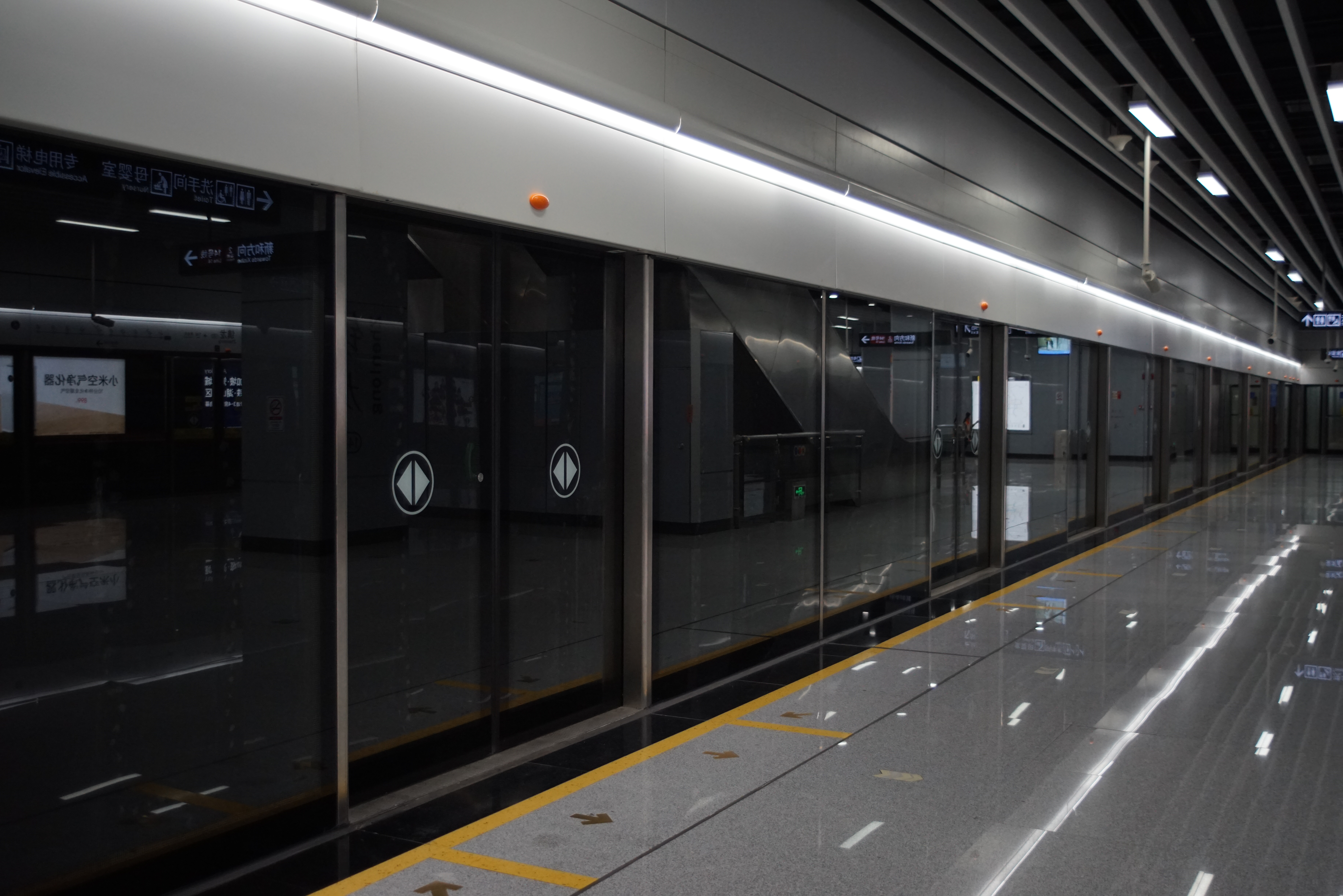 鎮龍站預留的21號綫站臺